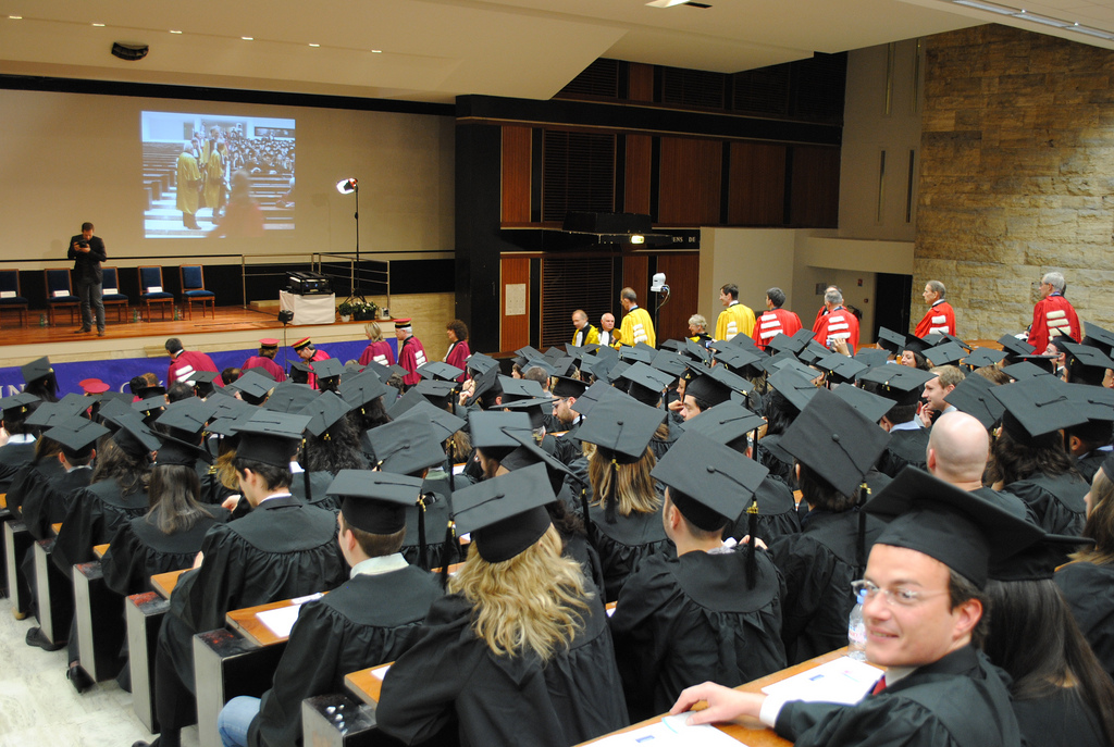 Remise des diplômes de docteurs de Sorbonne universités le 14 mai 2011.